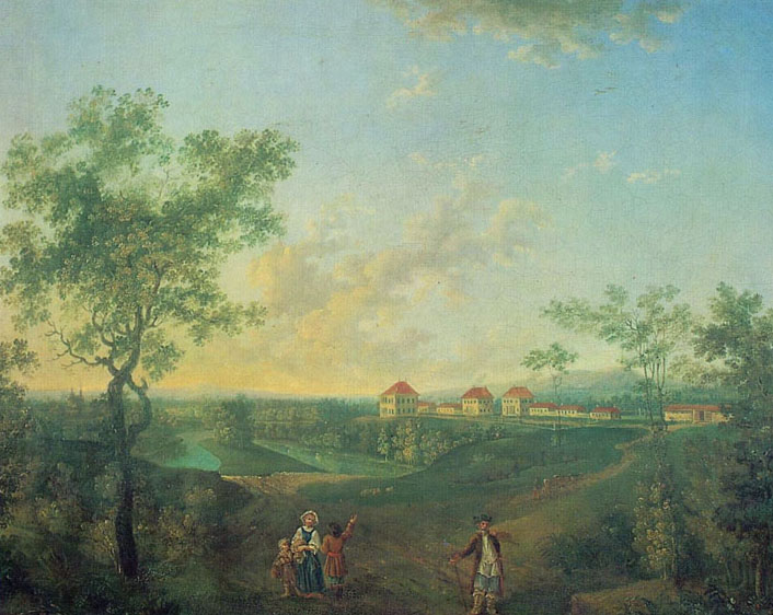 Служебные постройки усадьбы Надеждино